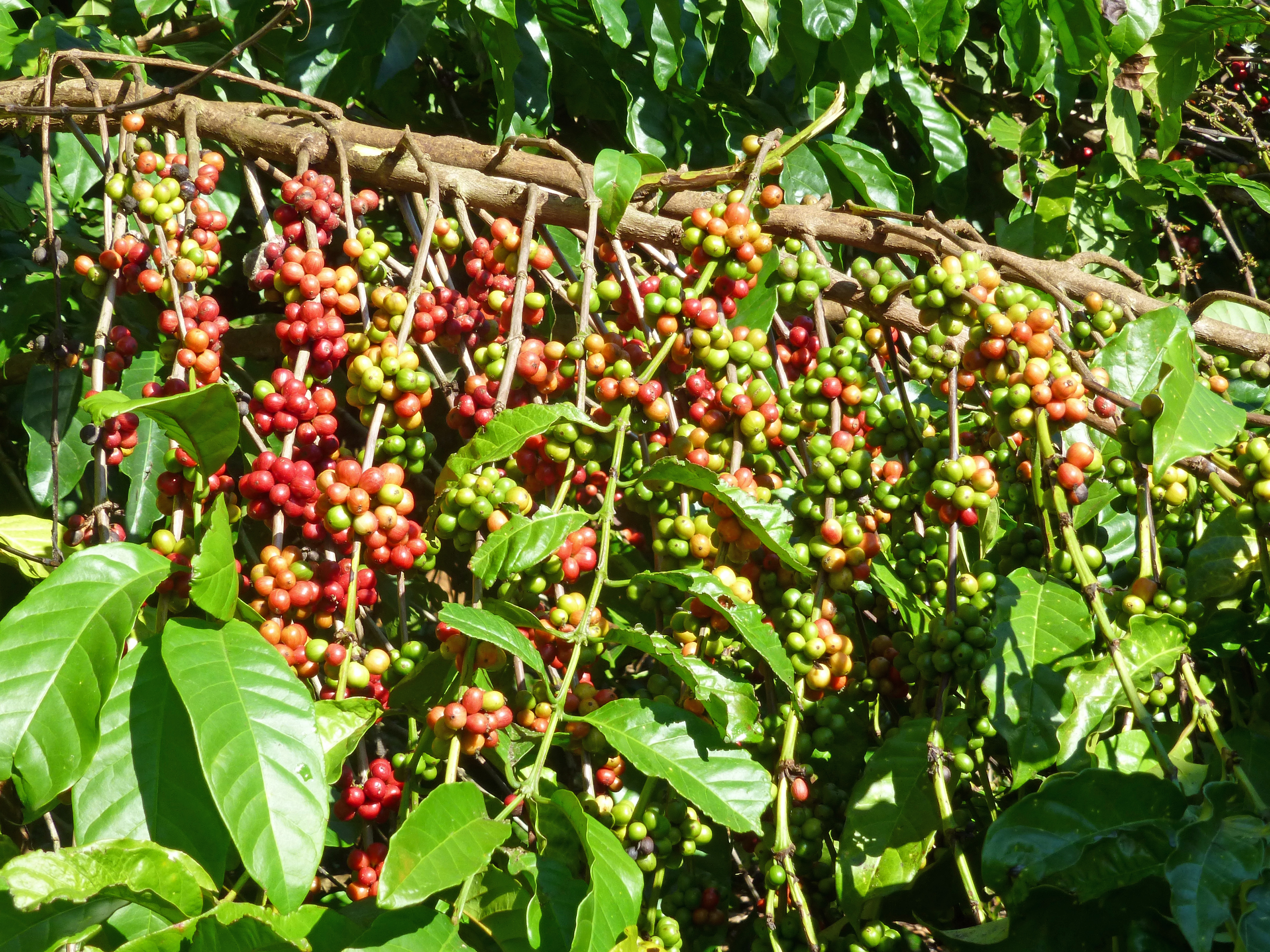 Plantation de café (Robusta) dans la vallée de Viñales (Cuba)